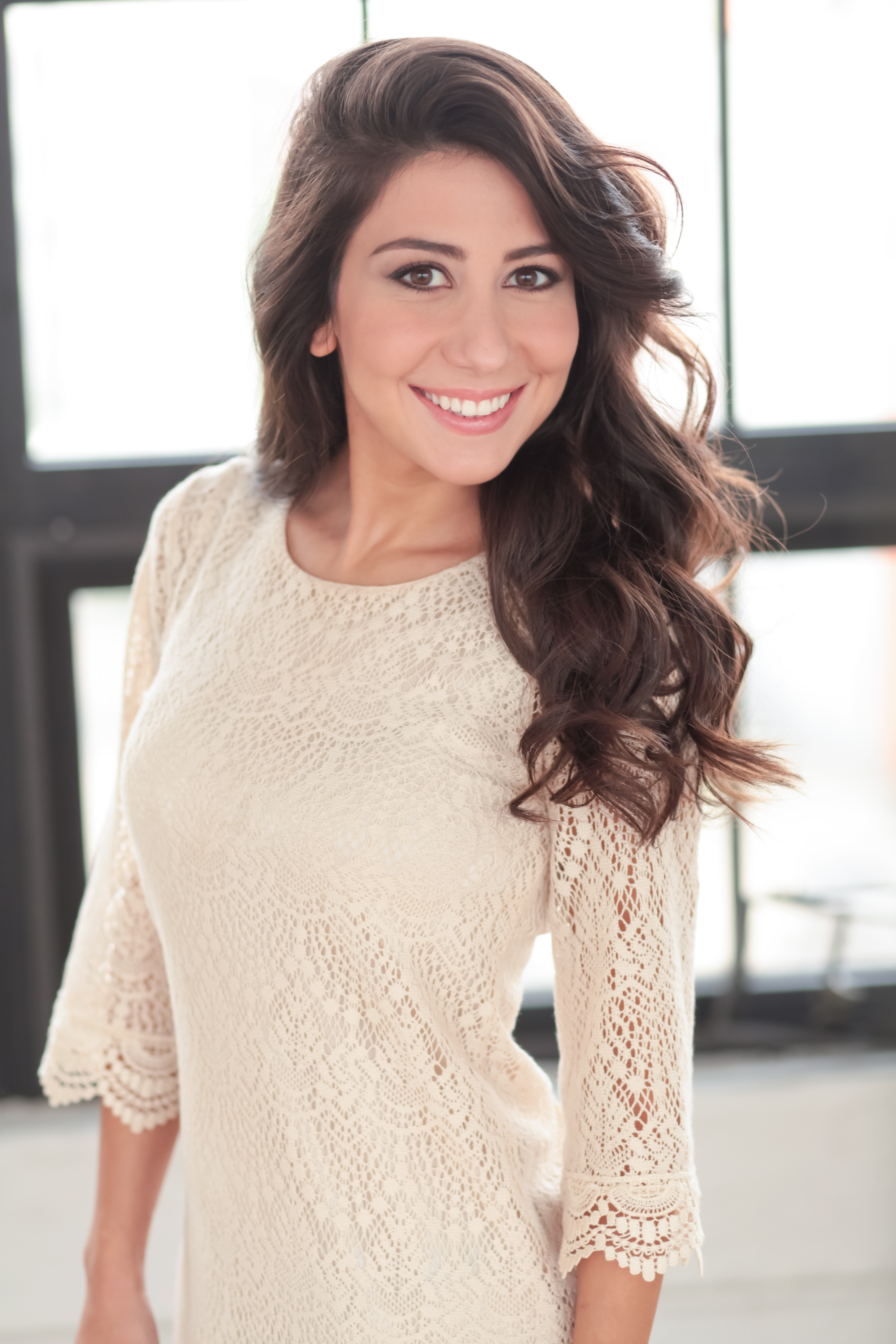 Esin Varan